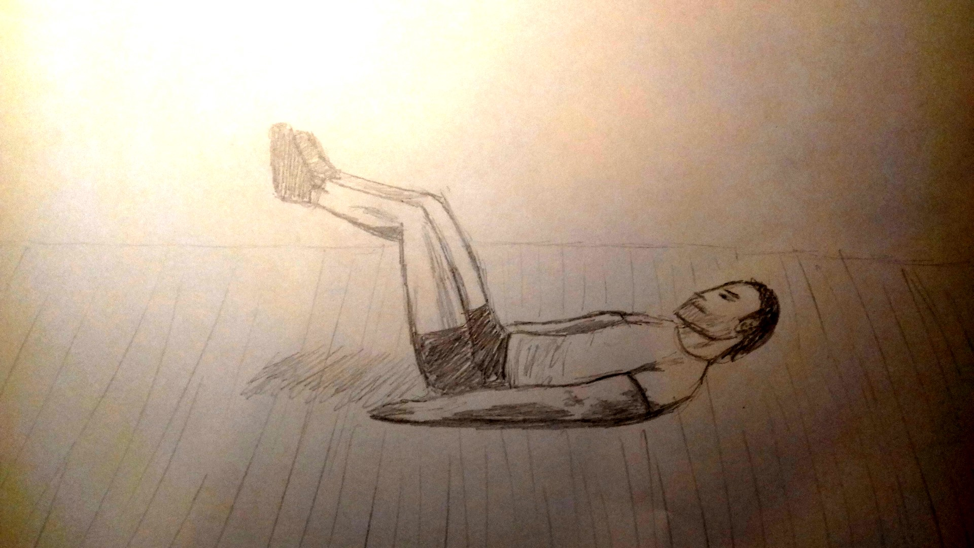 cuillère